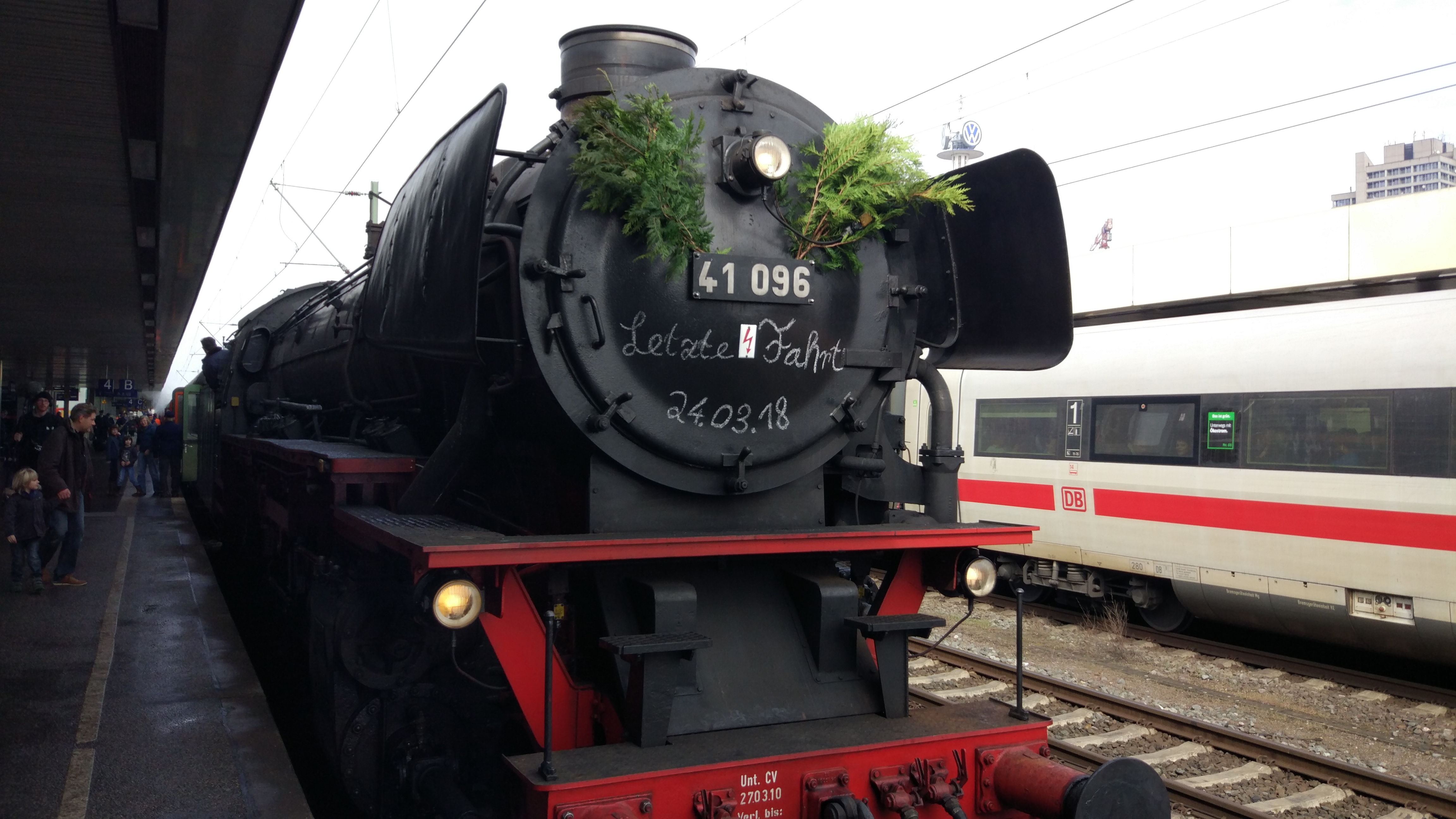 Letzte Fahrt der Dampflok 41 096 beim Halt in Hannover Hbf